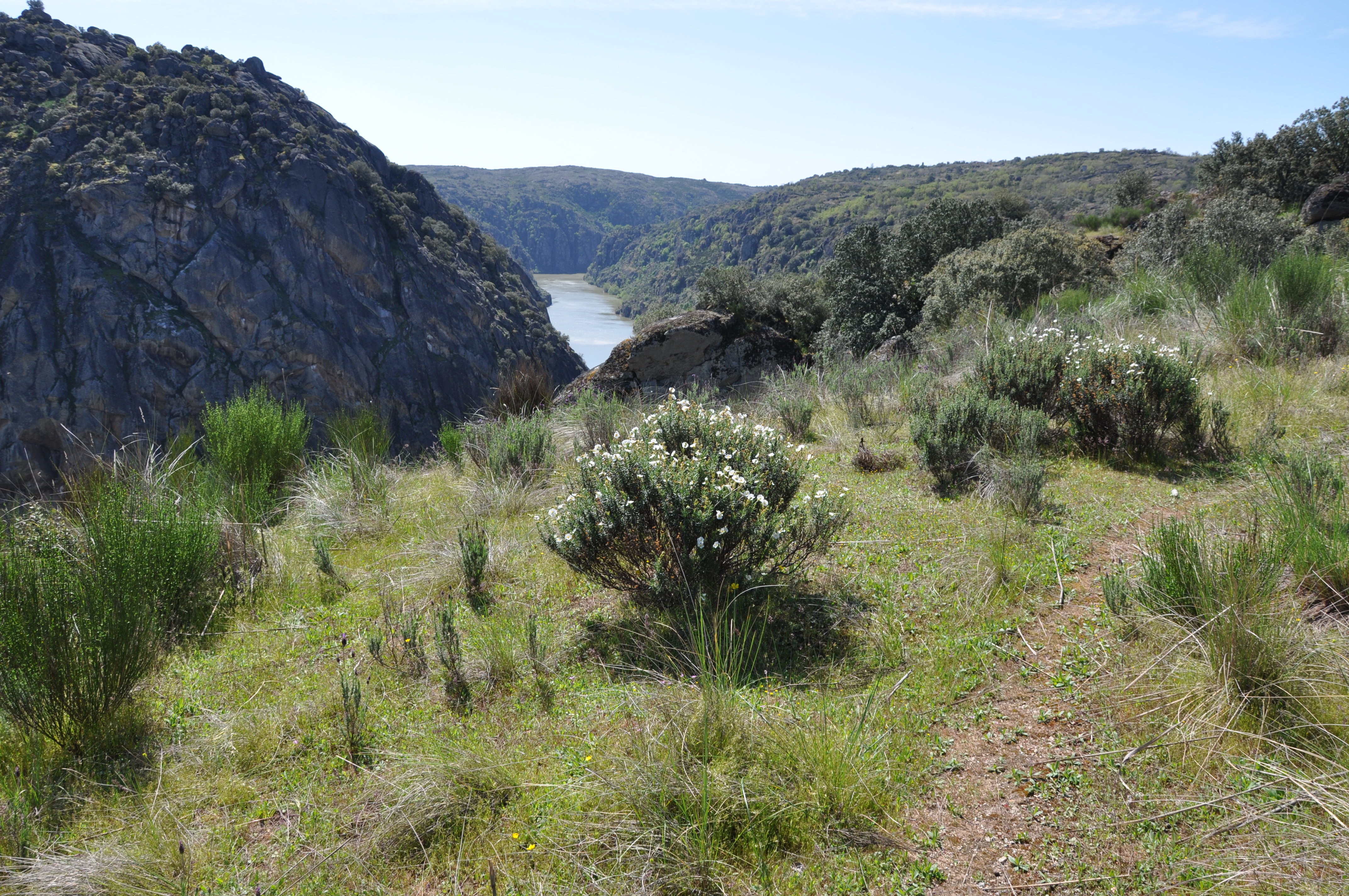 Chujarra (Halimium umbellatum), Miranda de Duero, Portugal. This is a photography of a Site of Community Importance in Portugal with the ID: PTCON0022. Natura2000 entry, EEA entry